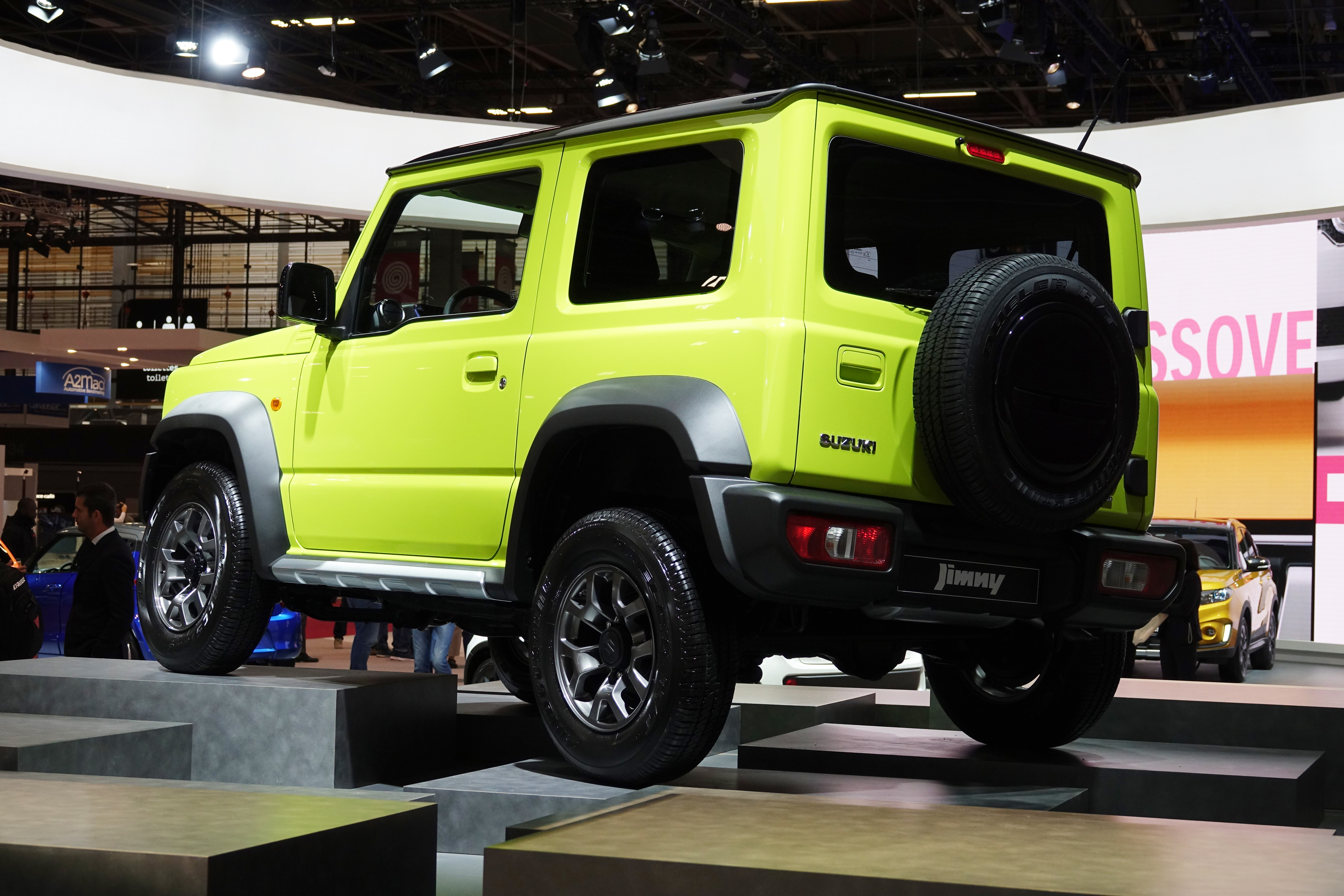 Suzuki Jimny IV au Mondial Paris Motor Show 2018